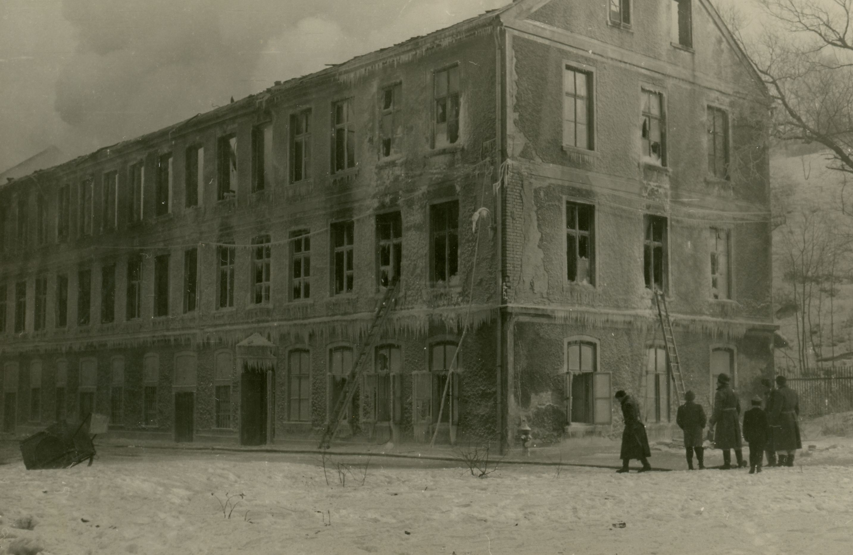 Vyhořelá budova Státní studijní knihovny v Liberci 1954